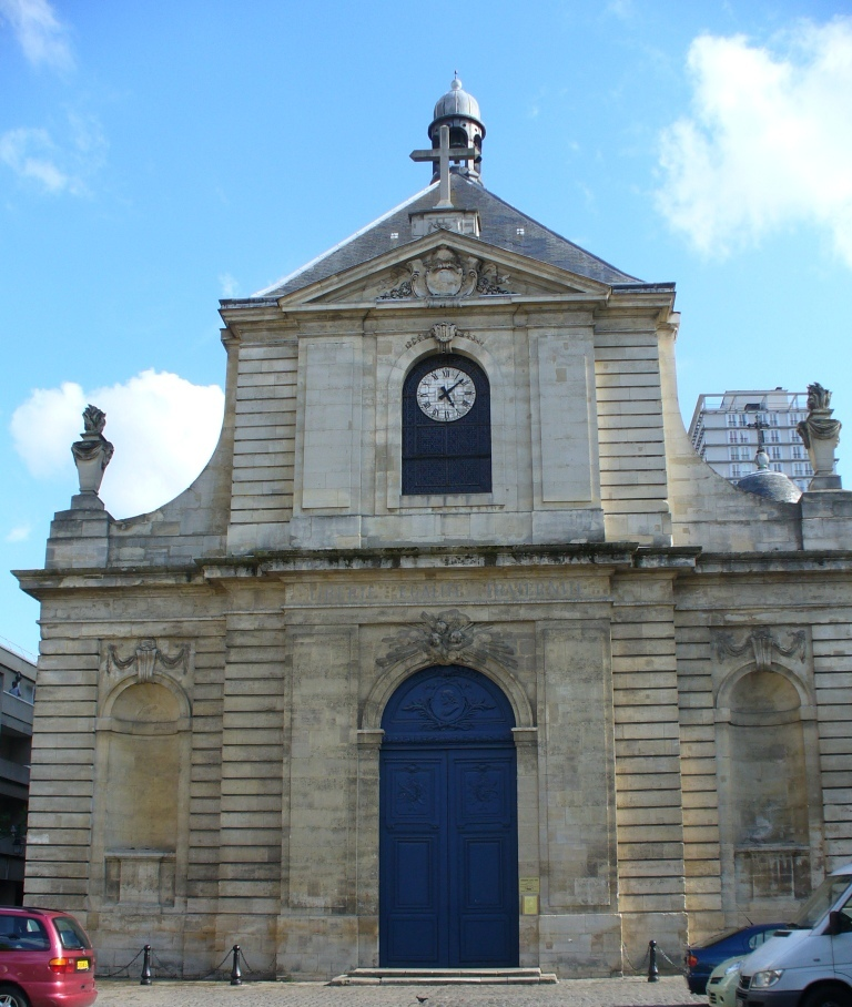 Eglise de Choisy-le-Roi